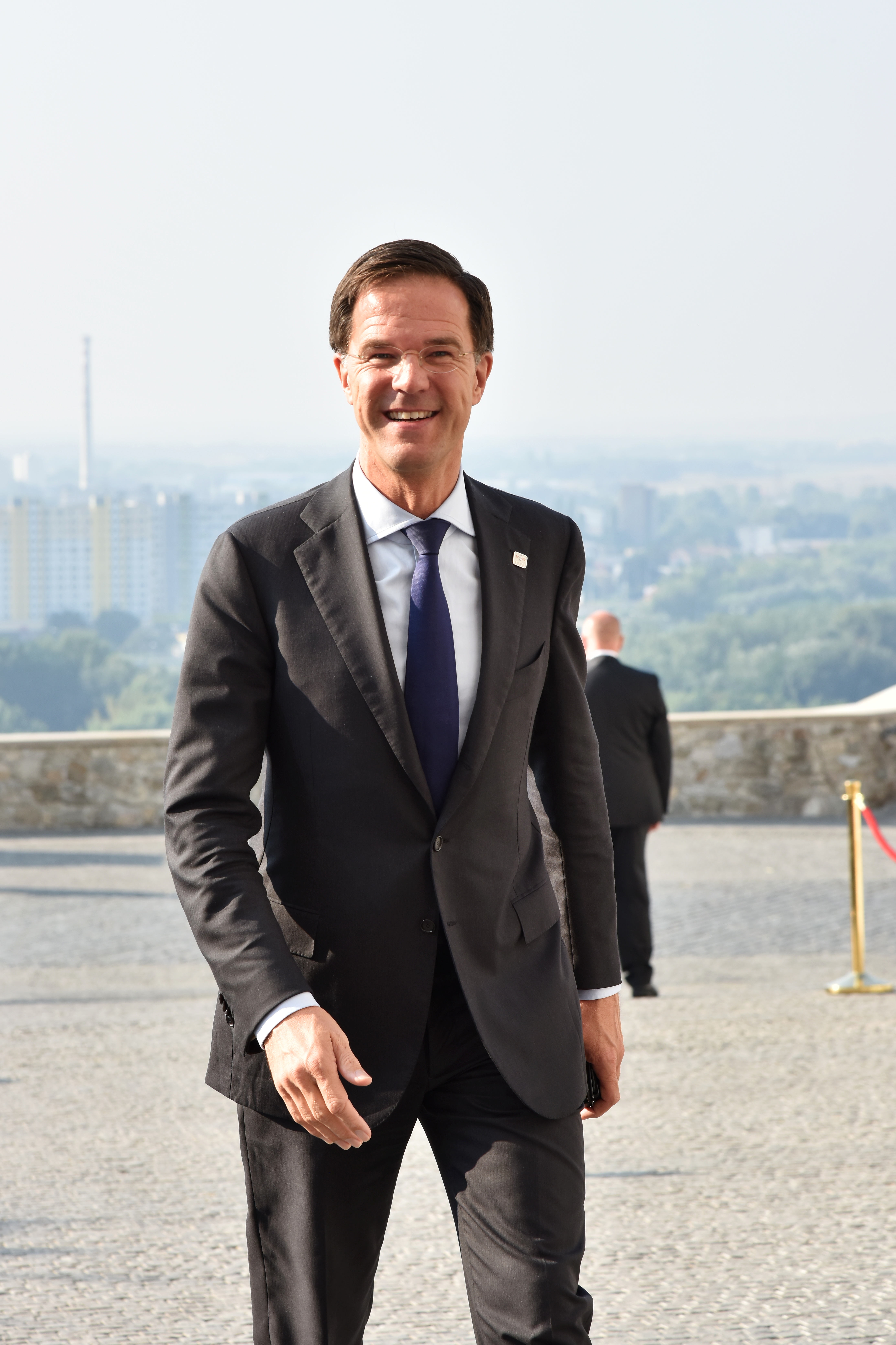 BRATISLAVA SUMMIT 16 SEPTEMBER 2016 ph halime sarrag